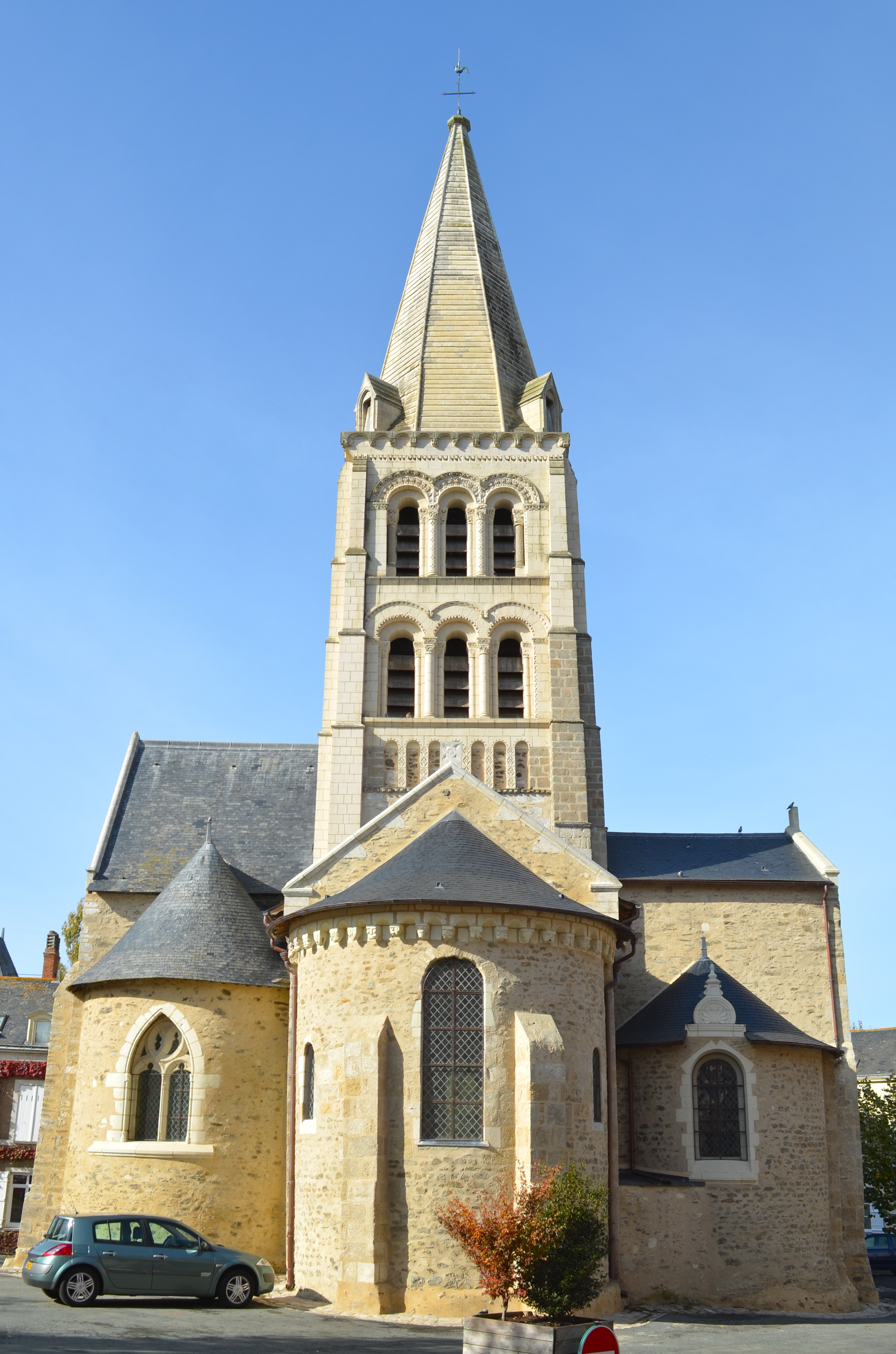 Église Notre-Dame - Chemillé (Maine-et-Loire)